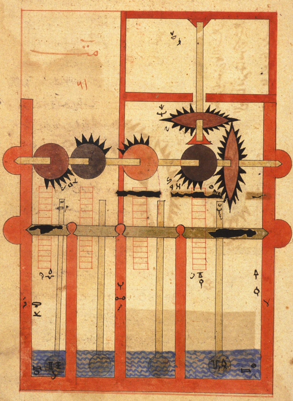 Arabic Machine Manuscript (Orient manuscript 3306)